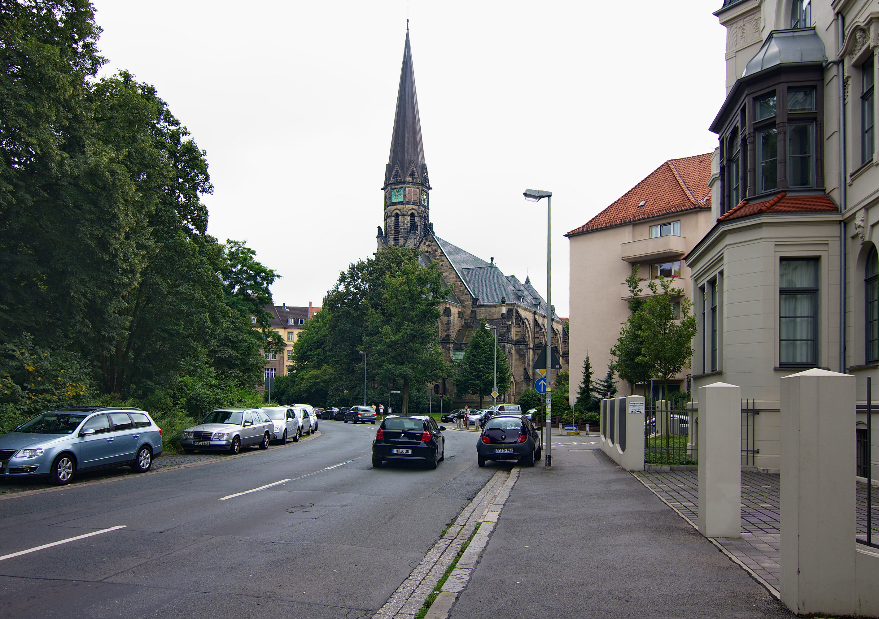 Markuskirche von 1906 in der List (Hannover), Niedersachsen, Deutschland